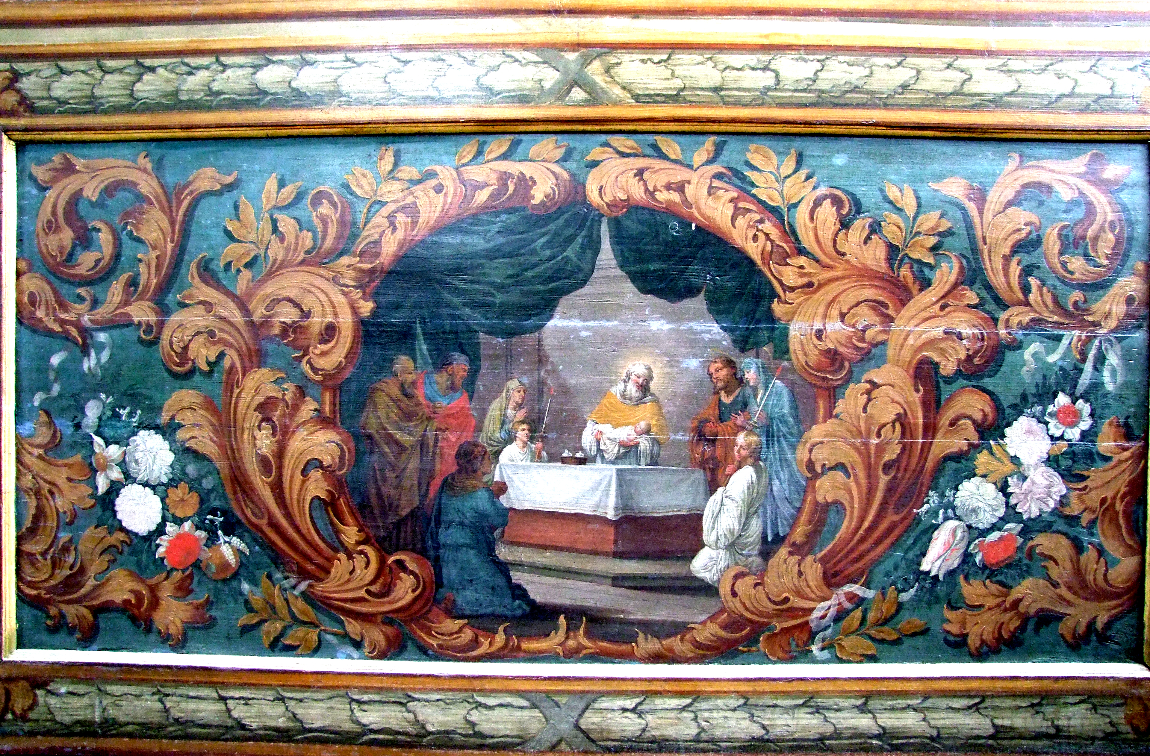 St. Maria im oberschwäbischen Buxheim bei Memmingen. Südlicher Lettneraltar, Darstellung Jesu im Tempel